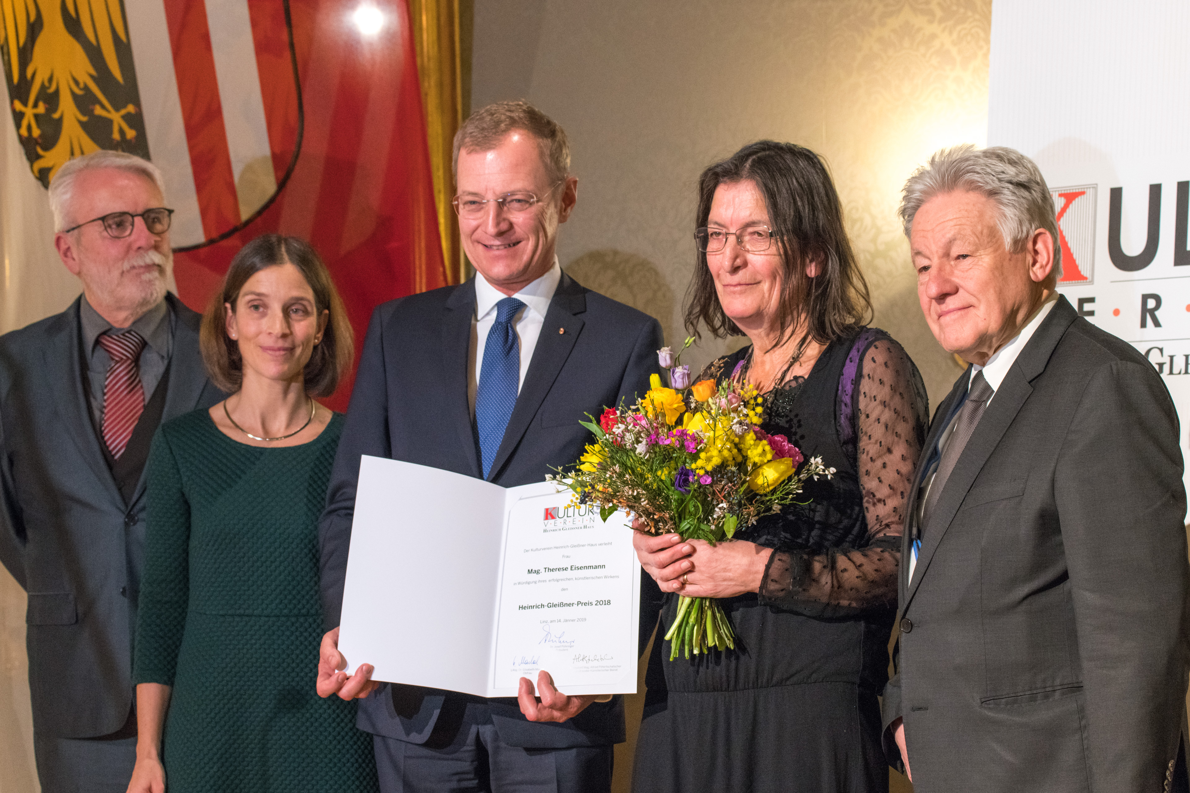 Verleihung Heinrich-Gleißner-Preis 2018 an Therese Eisenmann. Redoutensäle Linz